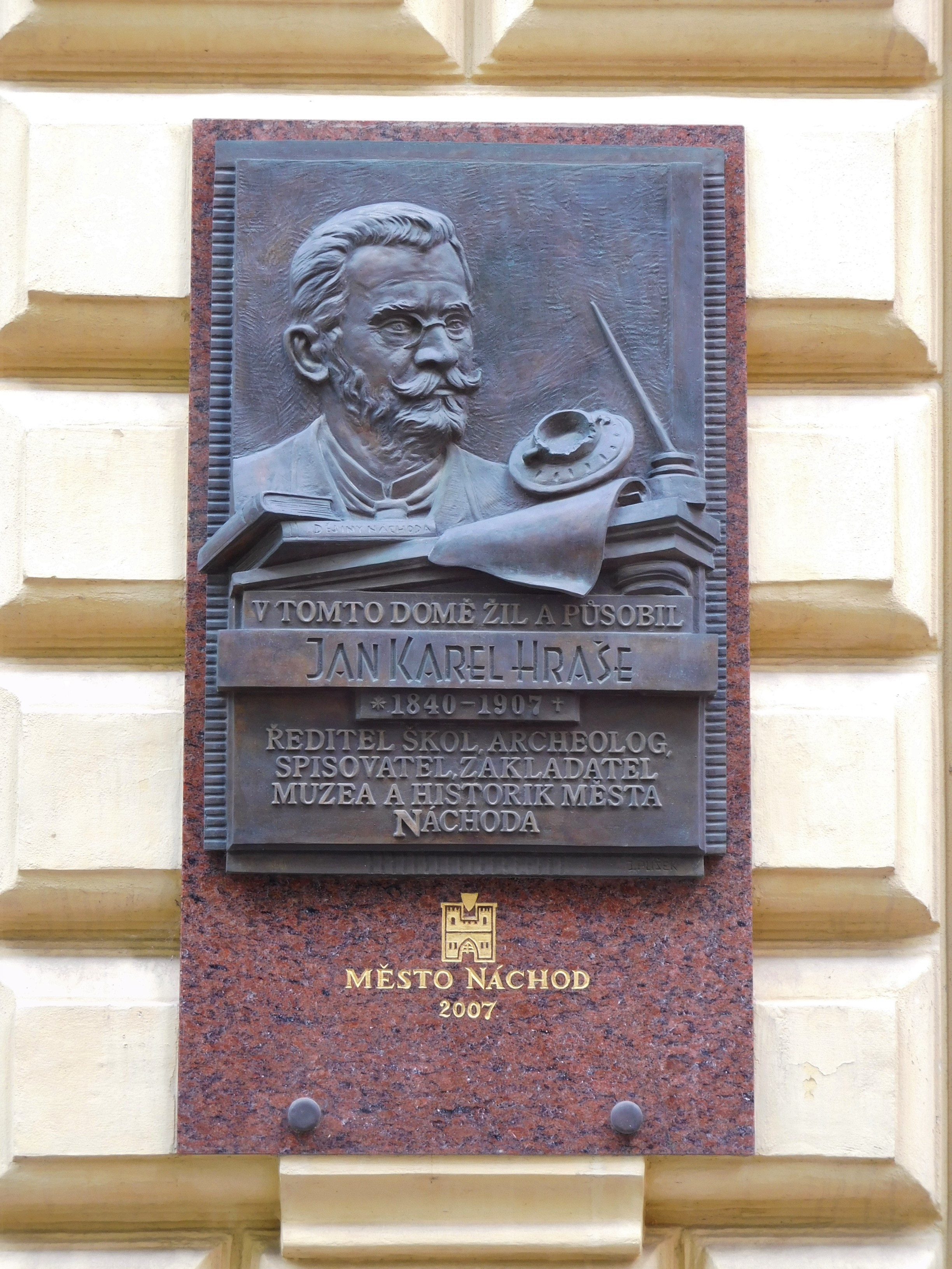 Náchod - Hrašeho 11, pamětní deska Jana Karla Hrašeho